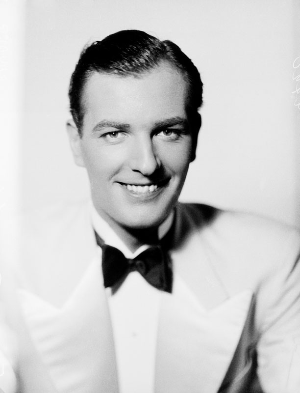 Porträtt av Gustav Wally (Gustaf Wallenberg), dansare, skådespelare och teaterchef.